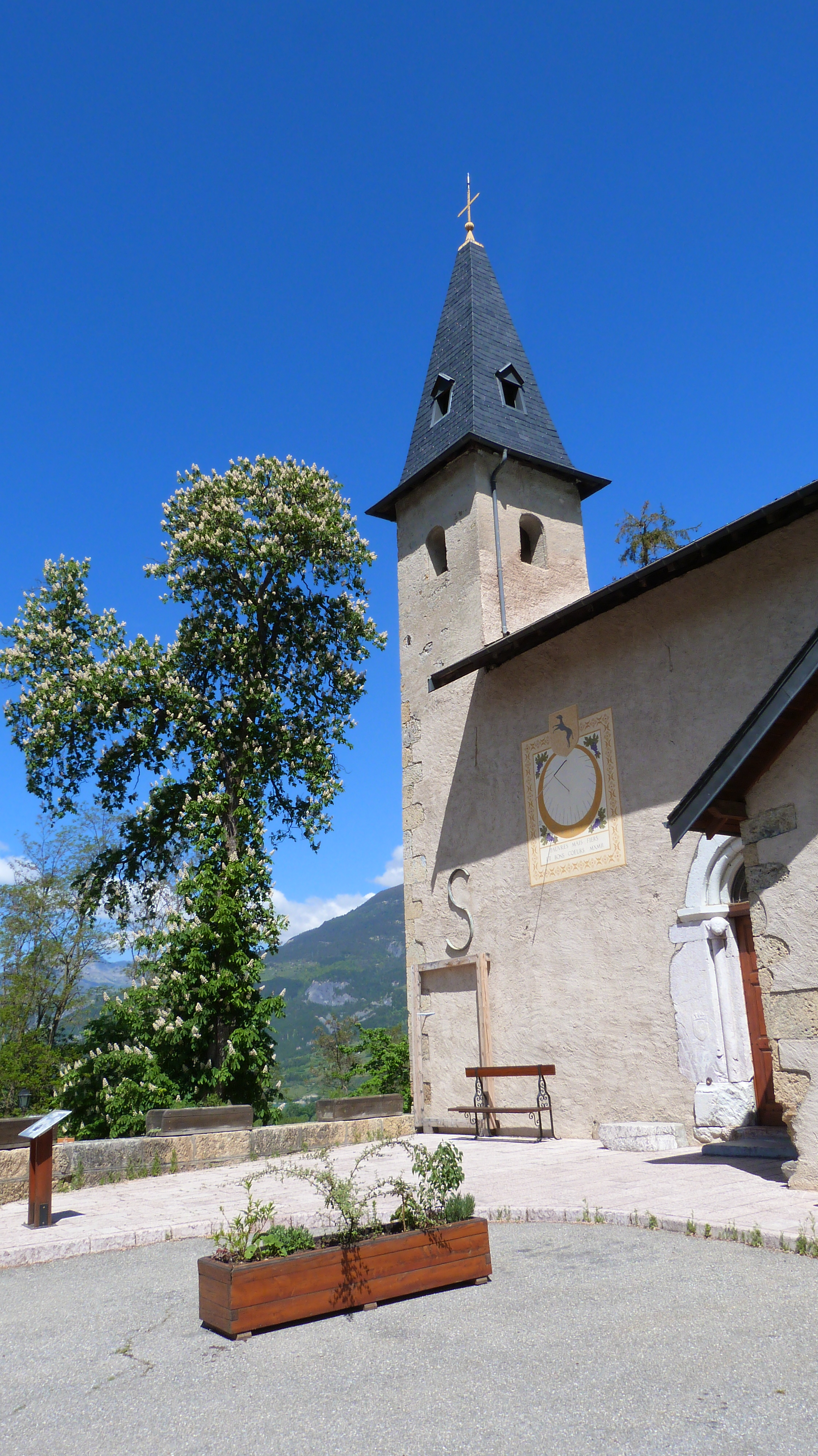 L'église arbore un beau cadran solaire